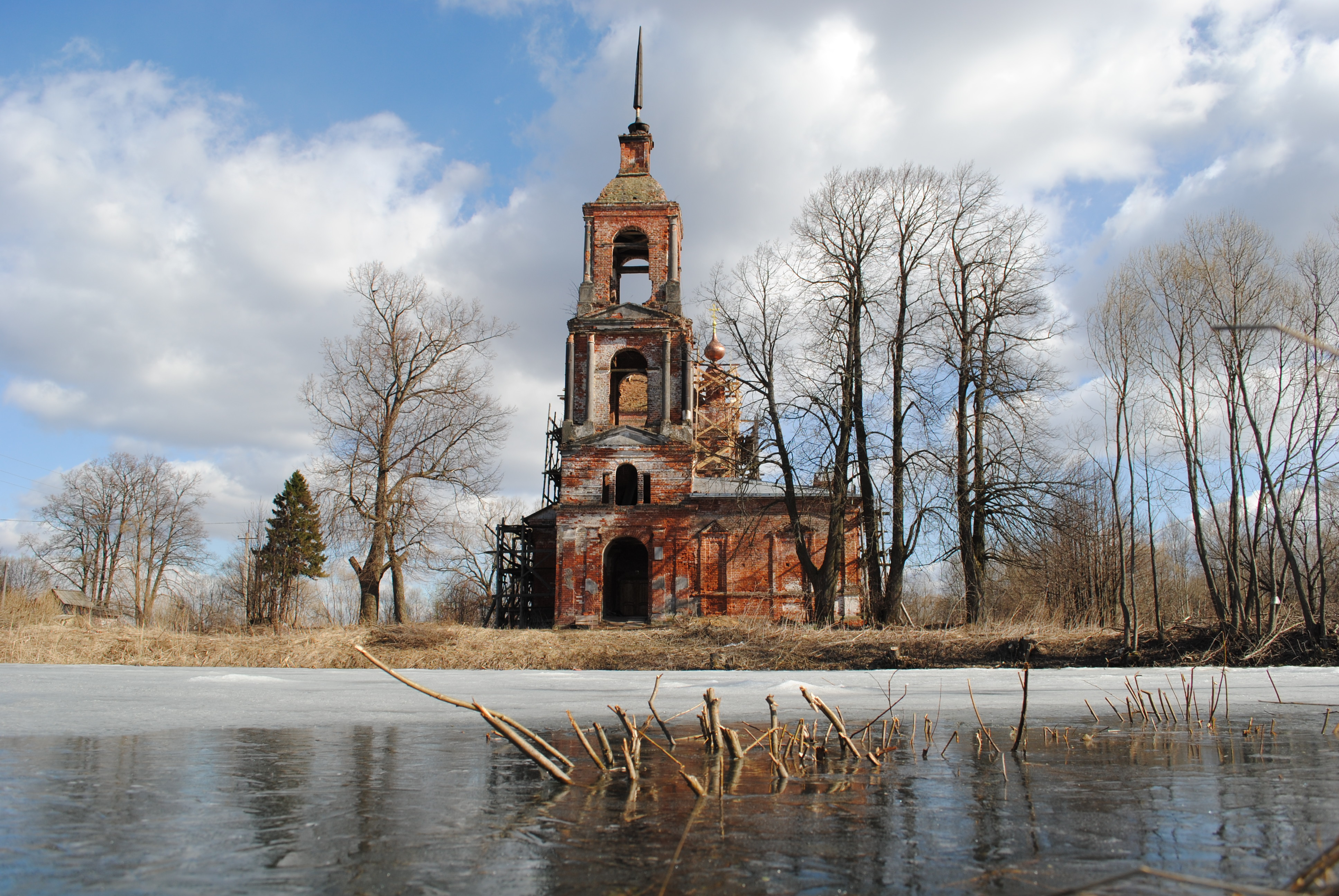 Церковь Рождества Христова: Новоселка, Александровский район, Владимирская область